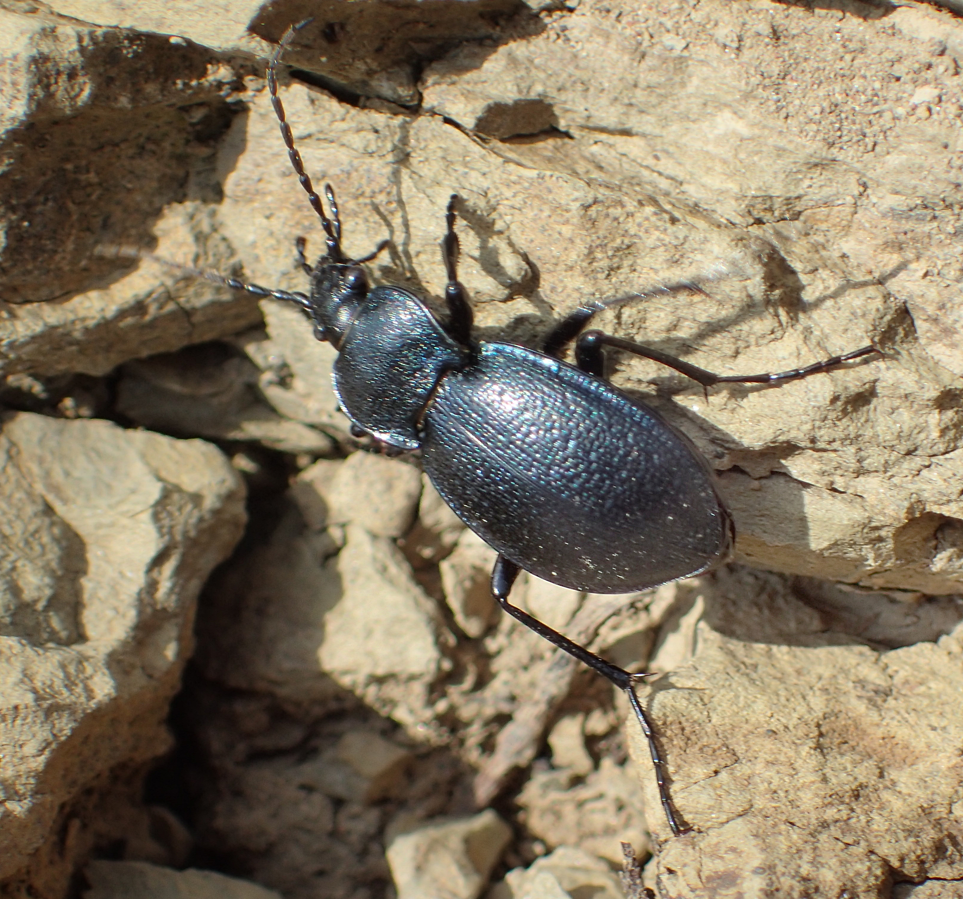 Carabus convexus moreanus aus Griechenland, Peloponnes, zwischen Krestena und Andritsena